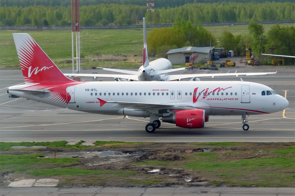 VIM Airlines, VQ-BTL, Airbus A319-111